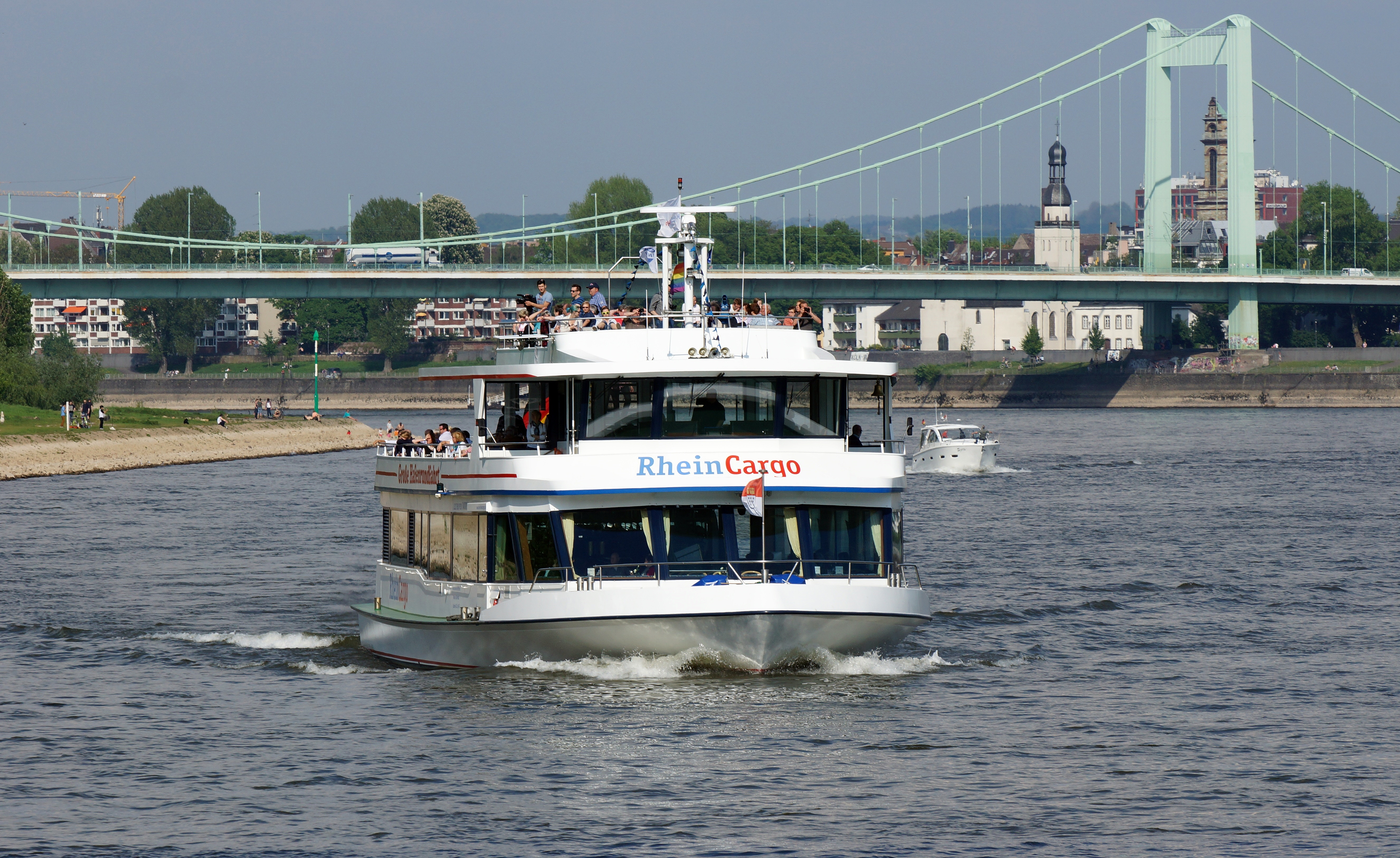 Hafenrundfahrtschiff RheinCargo auf Fahrt in Köln.